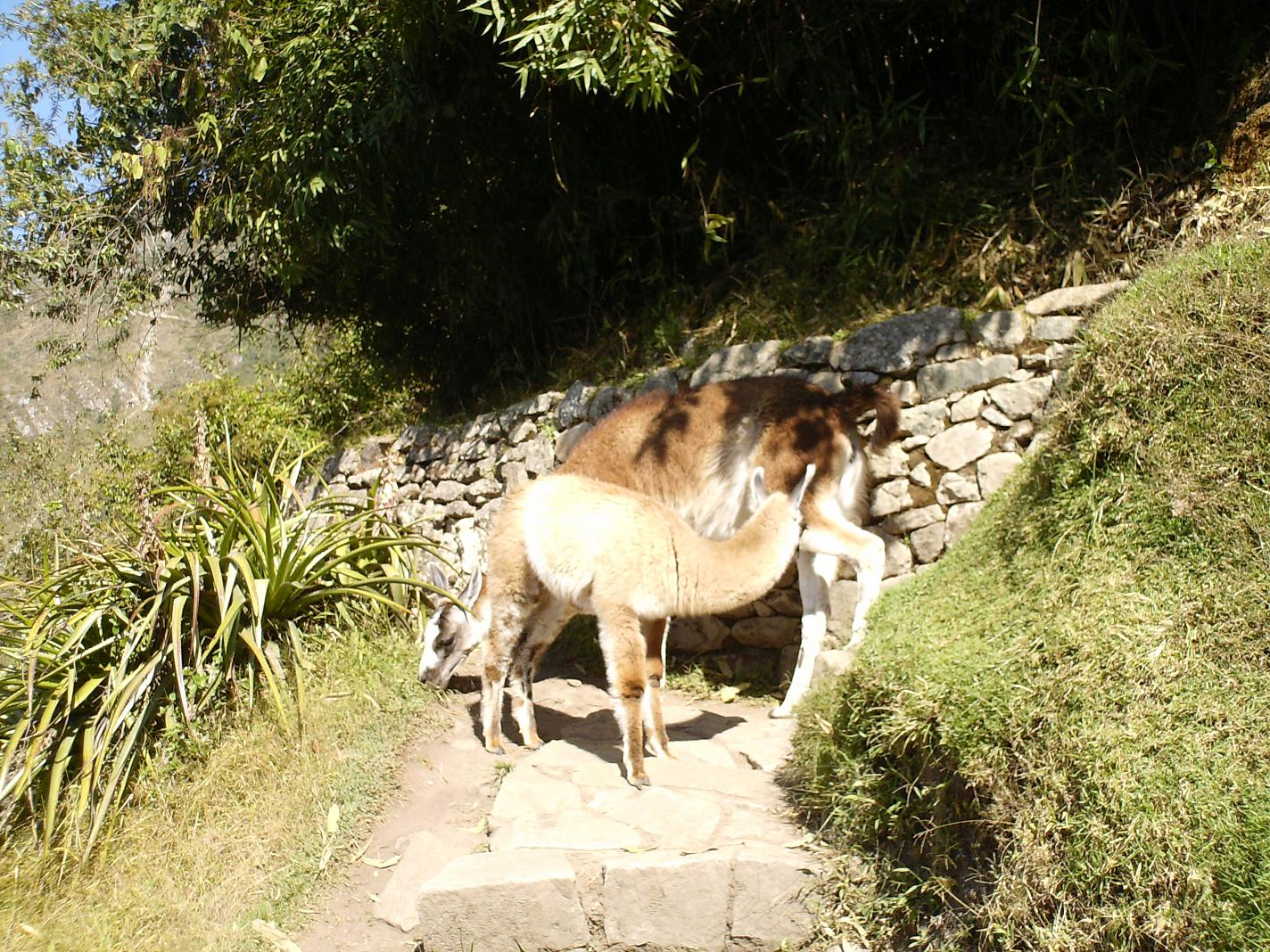 Llamas en los caminos del Inca. Vacaciones 2008 Yerlit